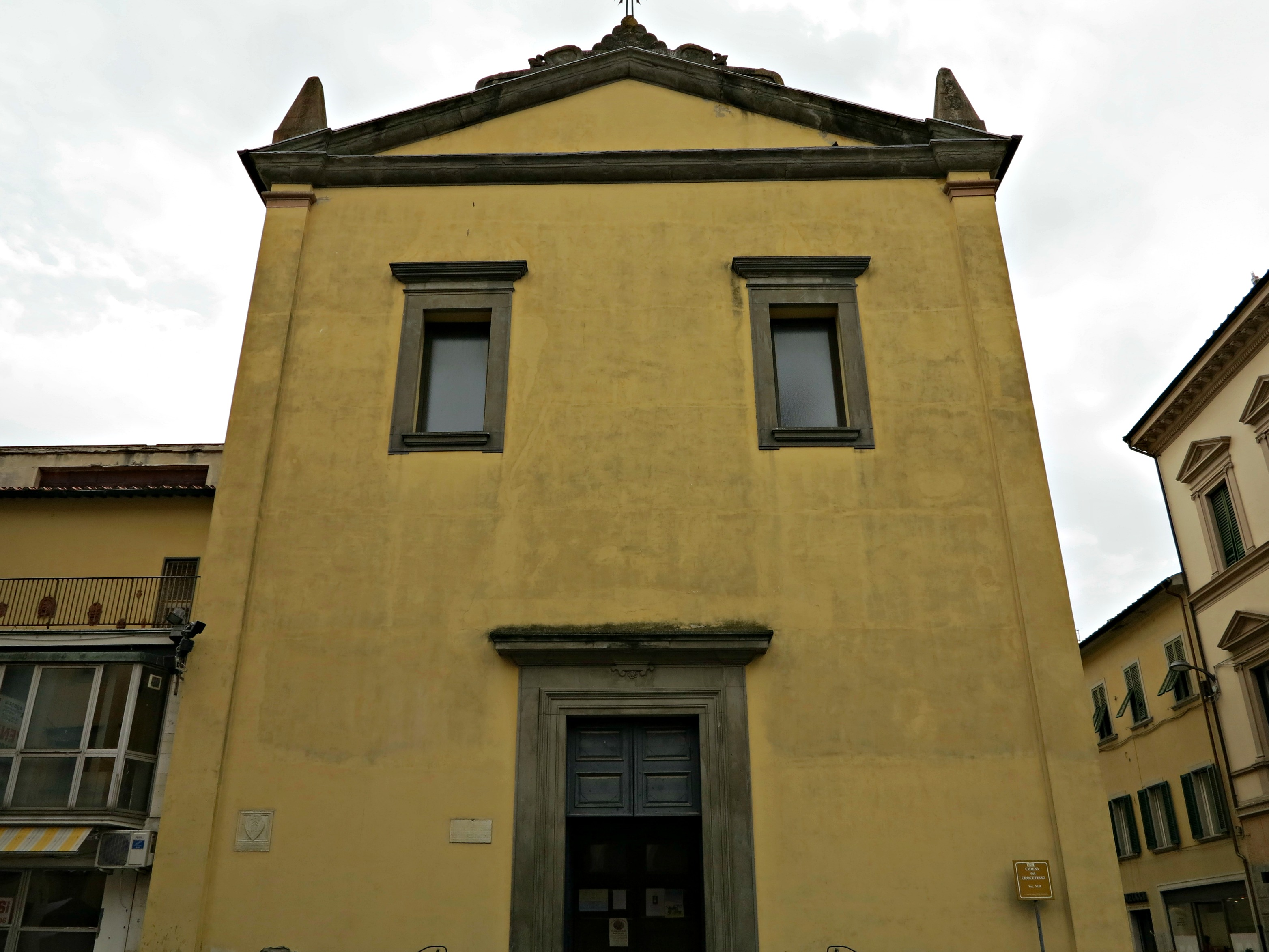 Esterno del santuario del santissimo crocifisso, Pontedera (1)